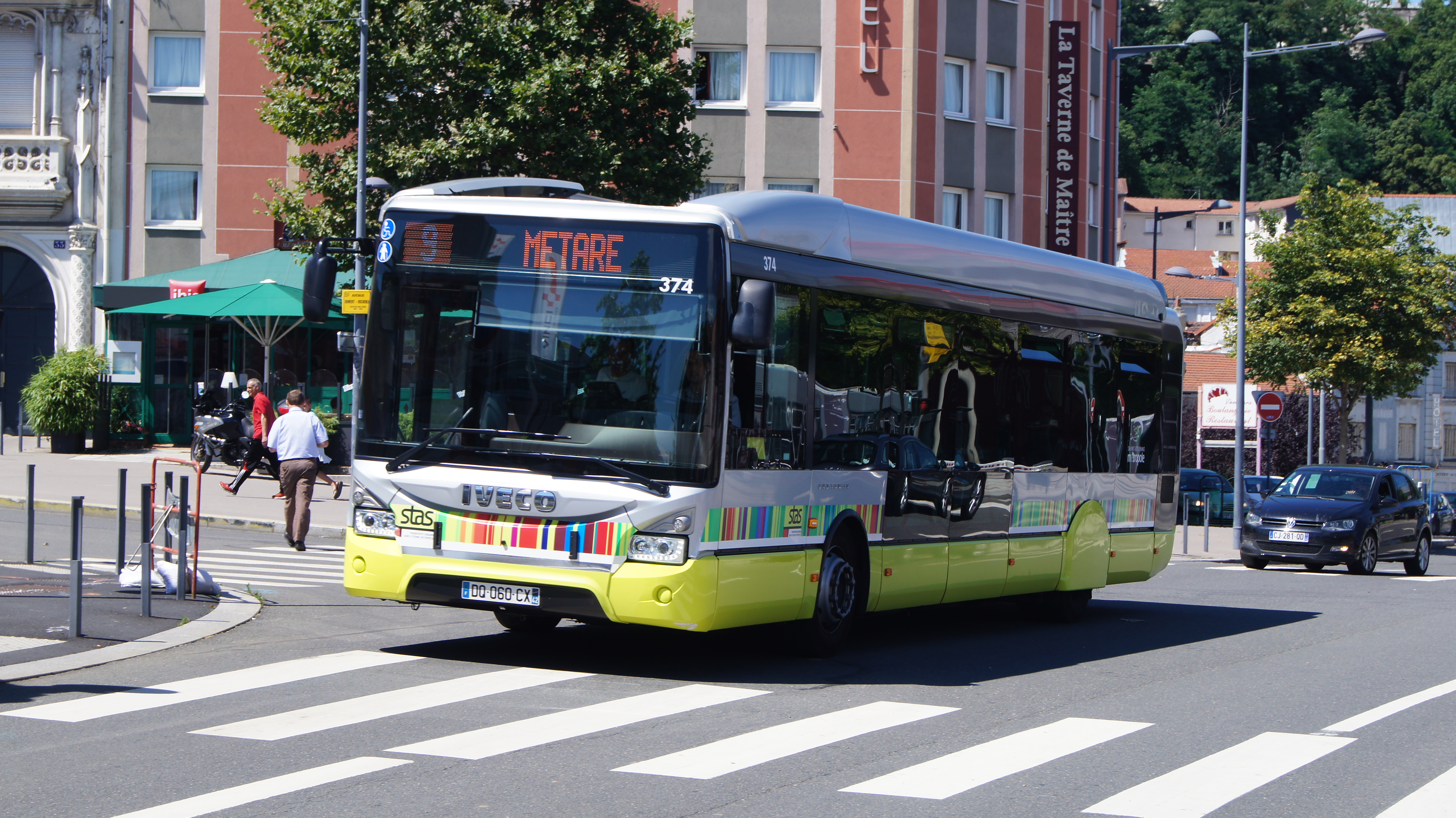 Gare et Pôle de correspondance Saint-Etienne Châteaucreux